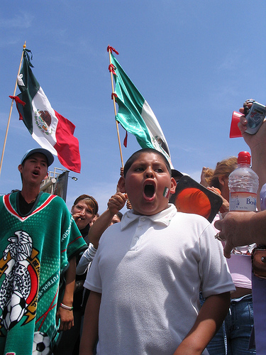 Un gordito y su hermano protestan para los derechos de imigrantes al Estados Unidos en Tijuana